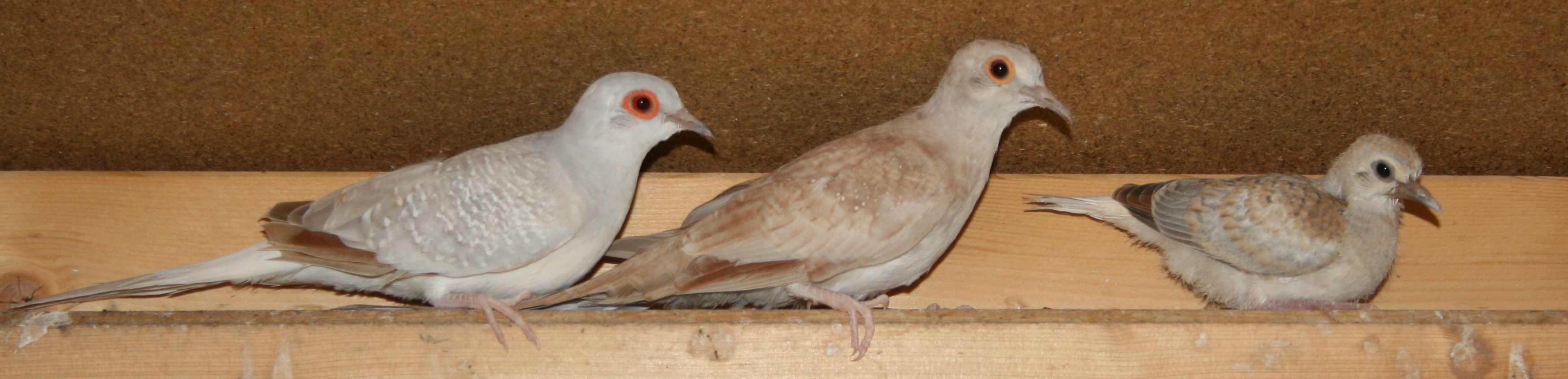 Geopelia cuneata